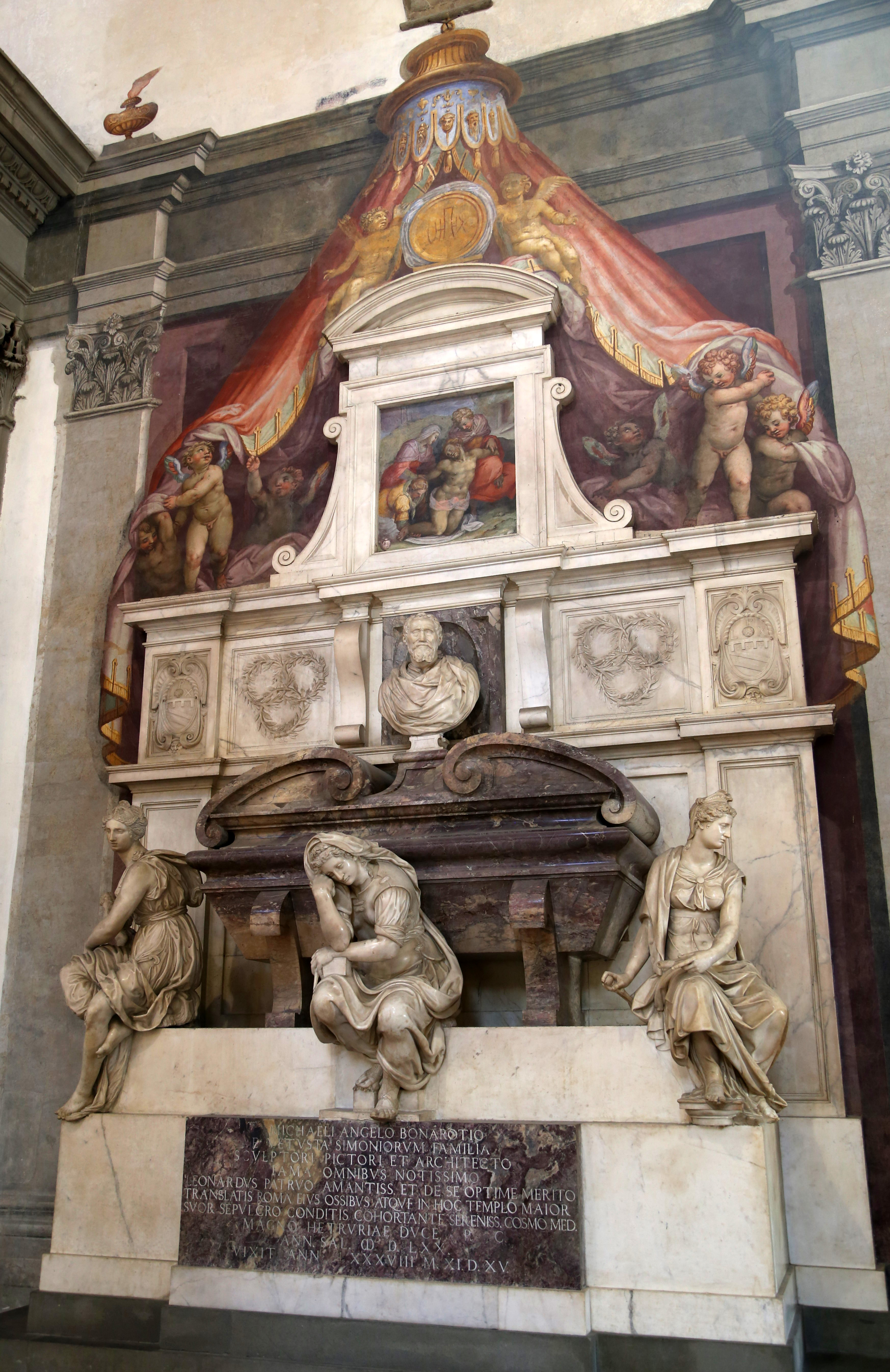 Grab von Michelangelo Buonarroti, Santa Croce, Florenz